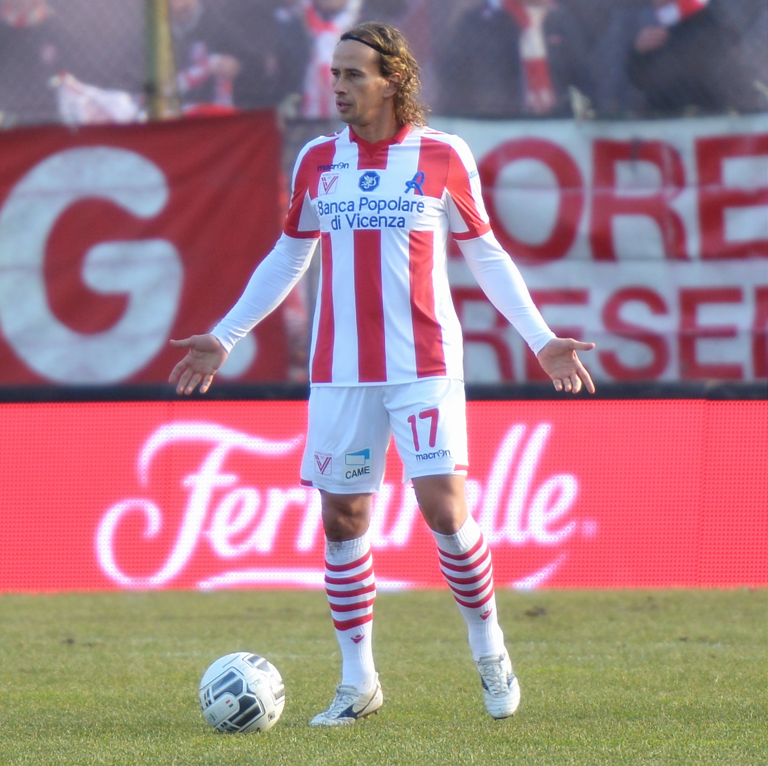 Thomas Manfredini, calciatore italiano, nel 2015